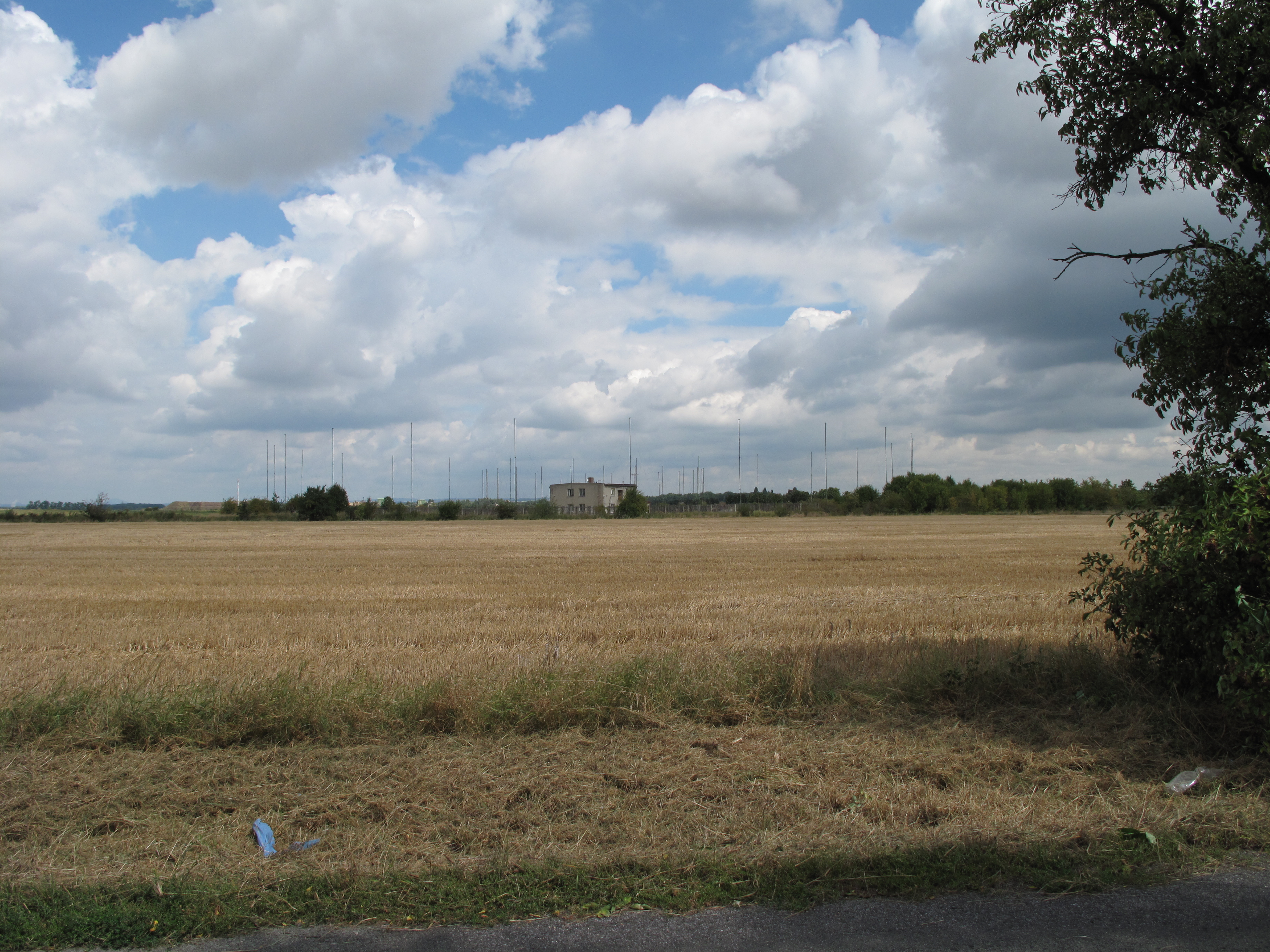 Objekt s rušičkami v katastrálním území Chlumín. Okres Mělník, Česká republika.